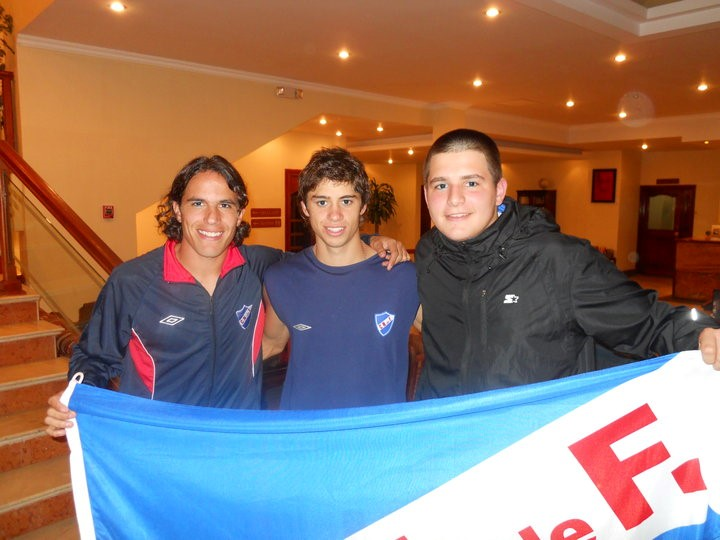 Matías Cabrera, en el centro de la fotografía.